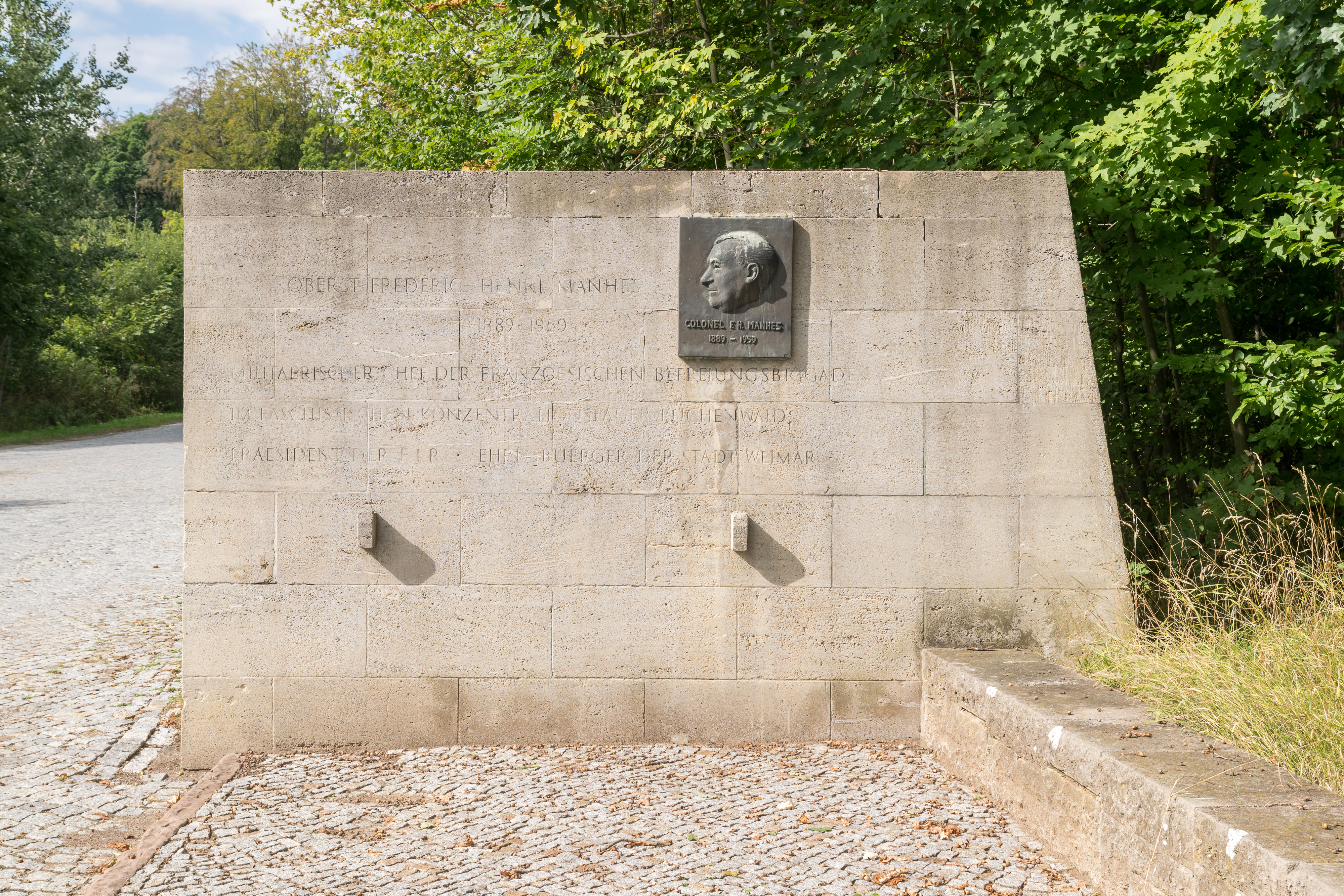 Blutstraße am Ettersberg bei Weimar; die Straße führt zum ehemaligen KZ Buchenwald und wurde von Lagerhäftlingen gebaut; Straßeneinfahrt mit Denkmal für Henri Manhès